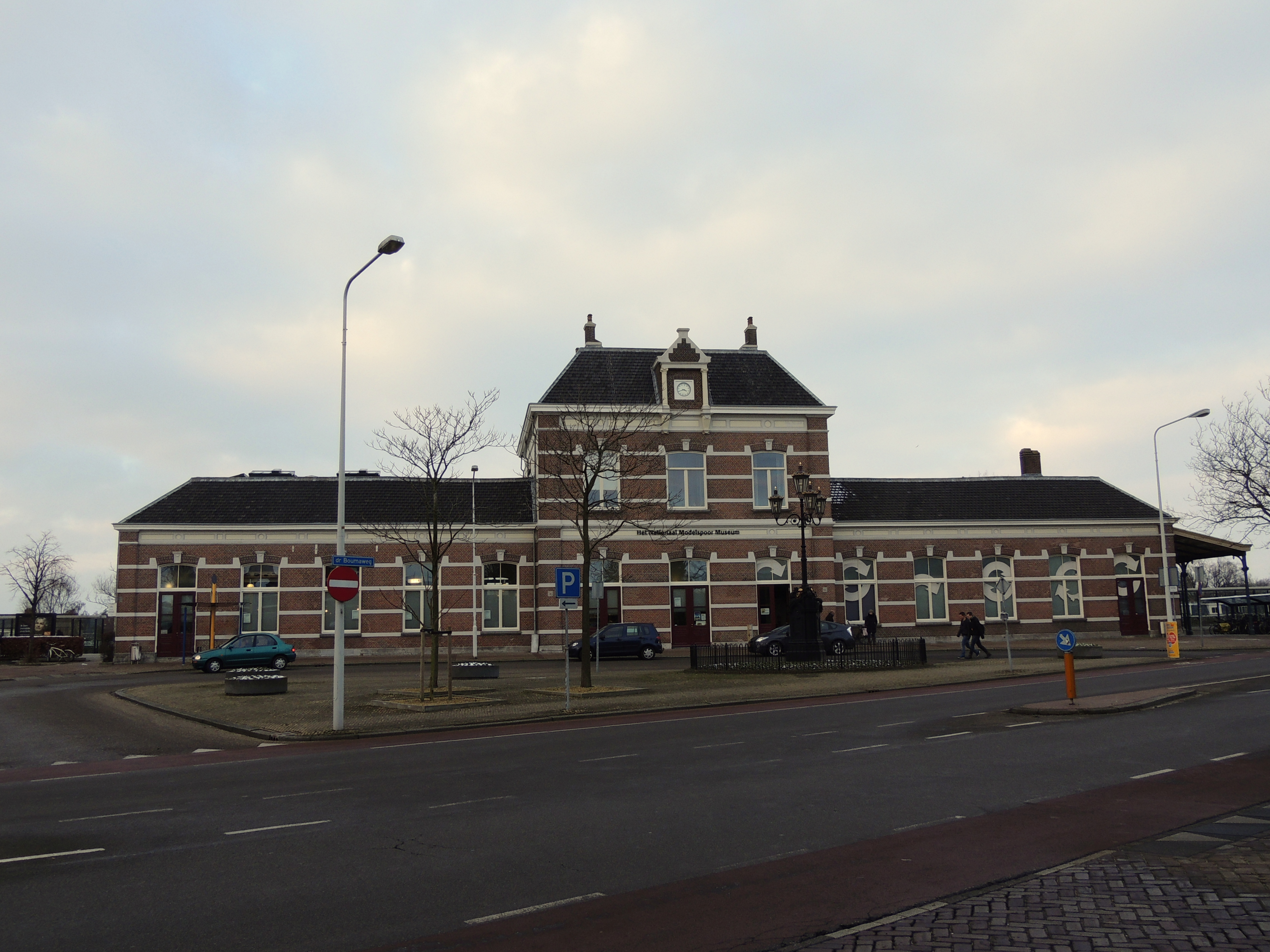 Het nationaal Modelspoor museum.